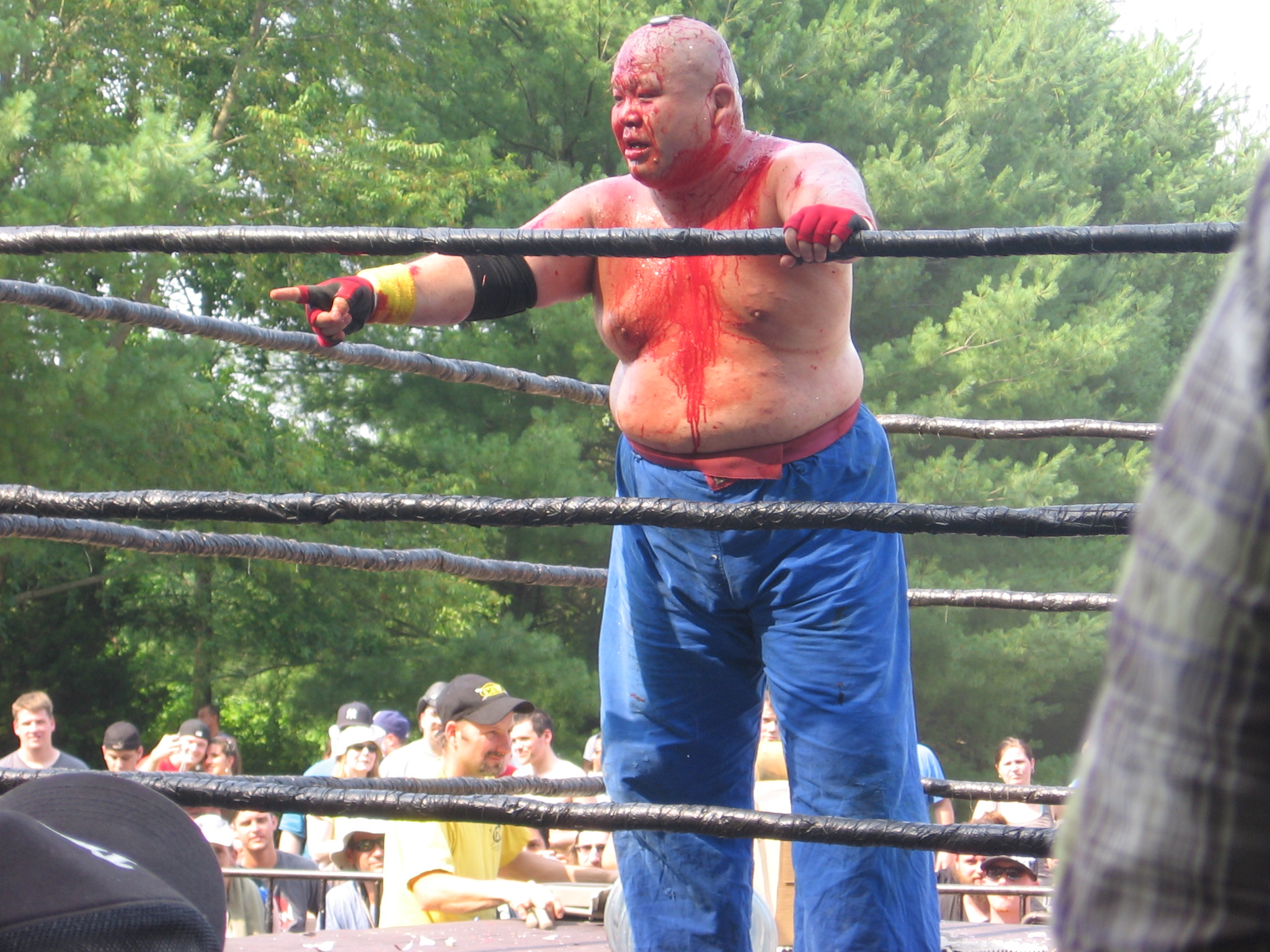 Abdullah Kobayashi